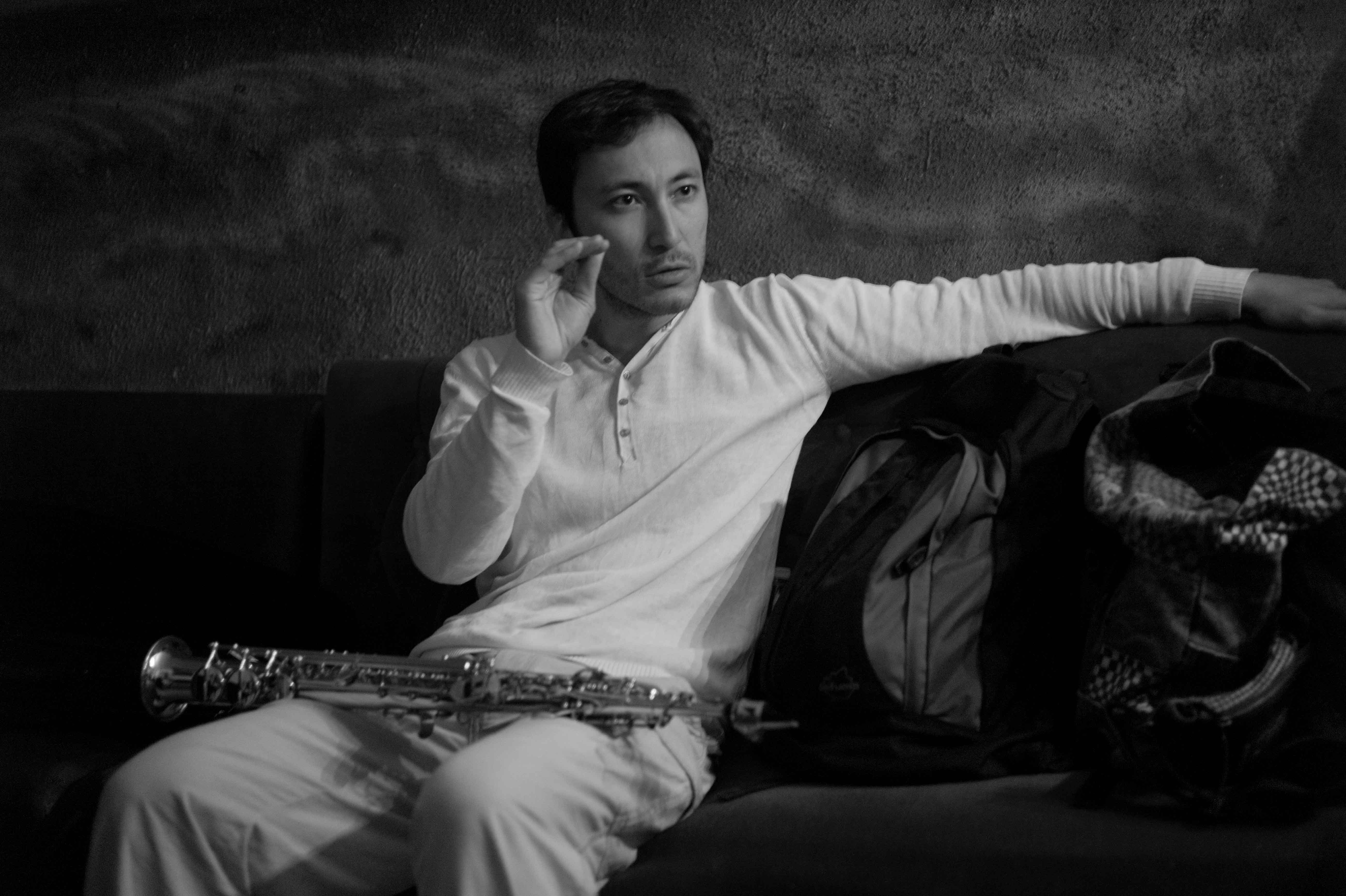 Vincent Lê Quang, interview au New Morning en 2011